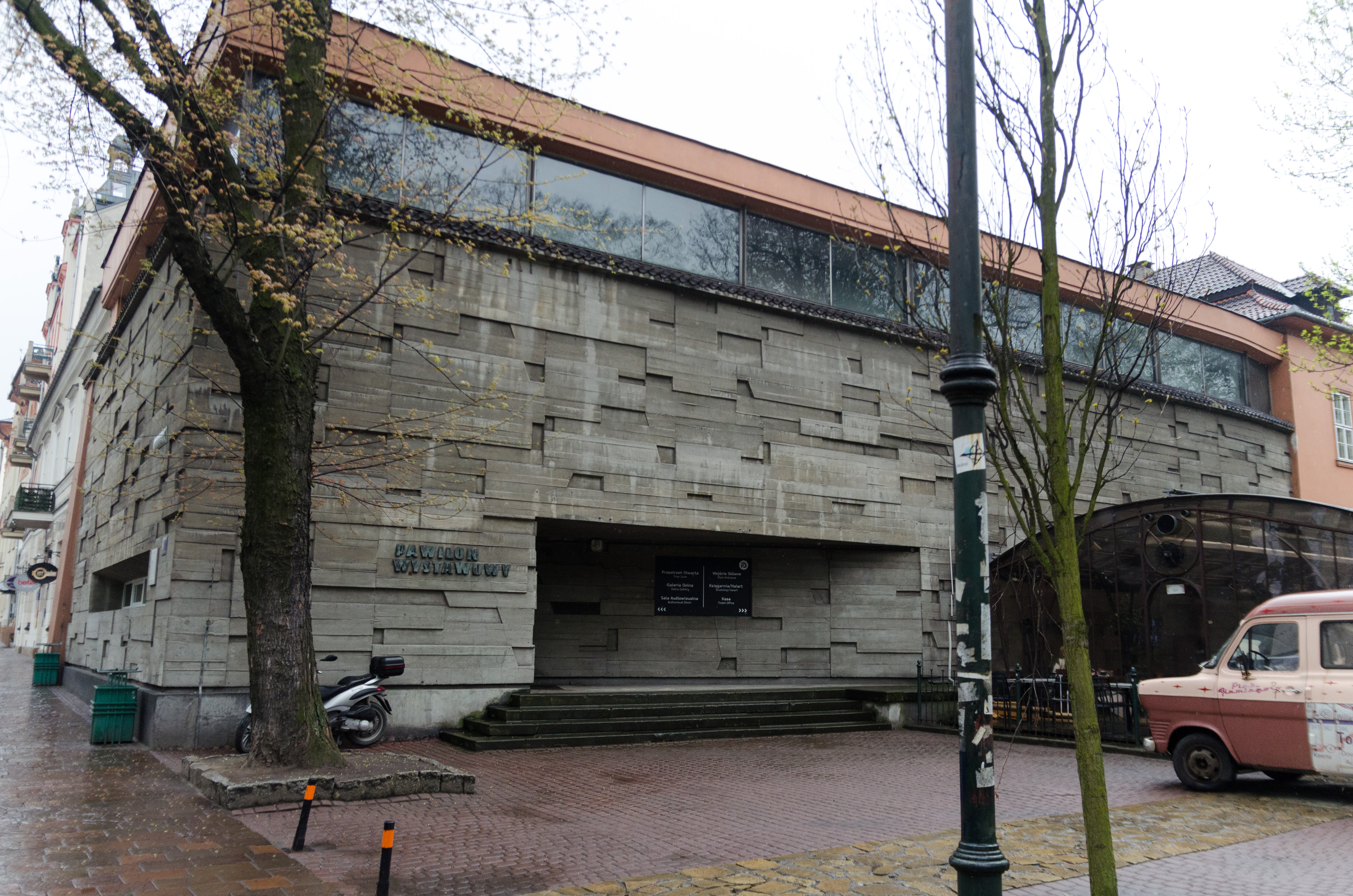 Bild på Bunkier Sztuki i Kraków våren 2014.